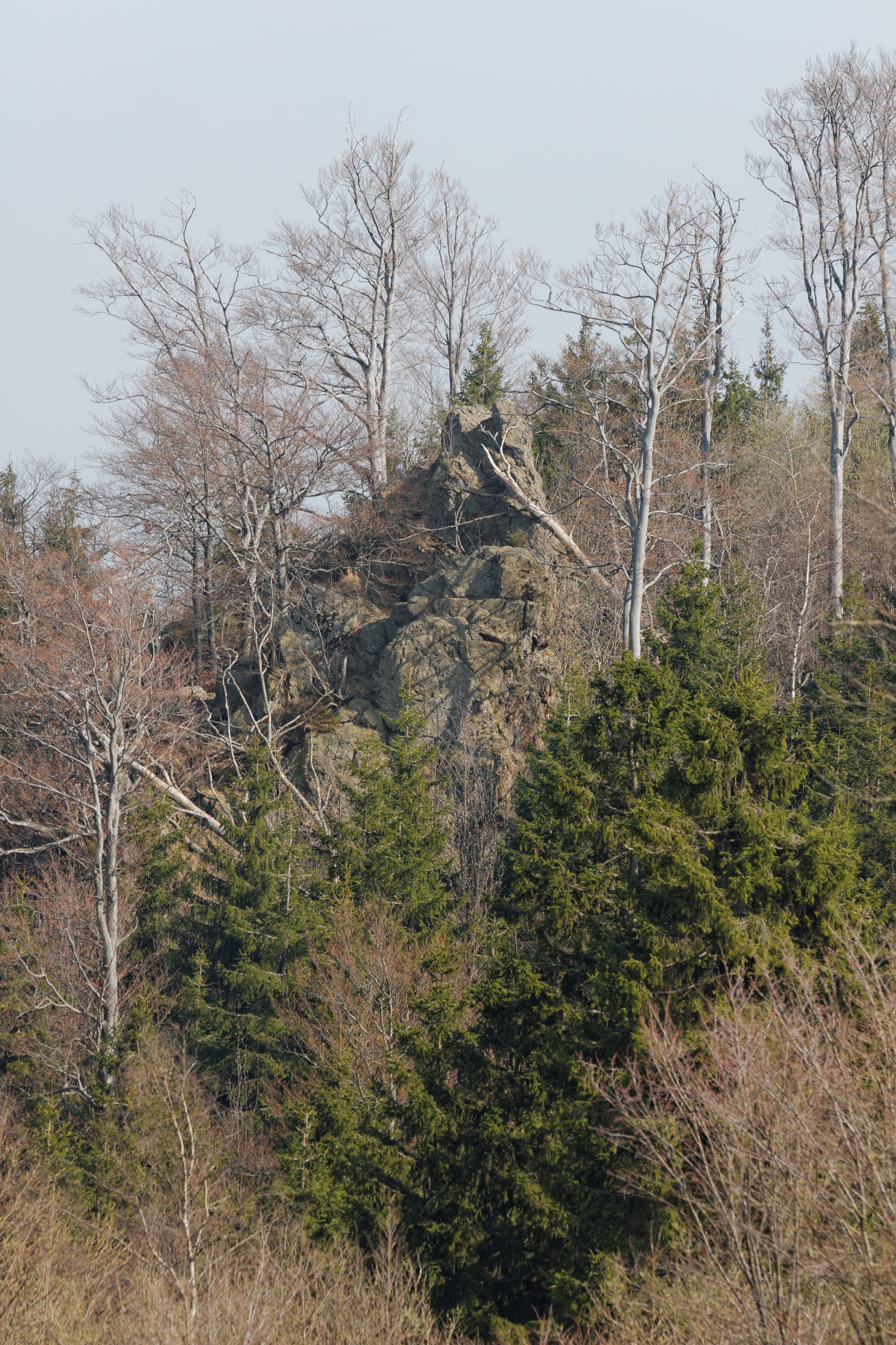 Der Jermerstein bei Braunlage, aufgenommen von der B4-Abzweigung